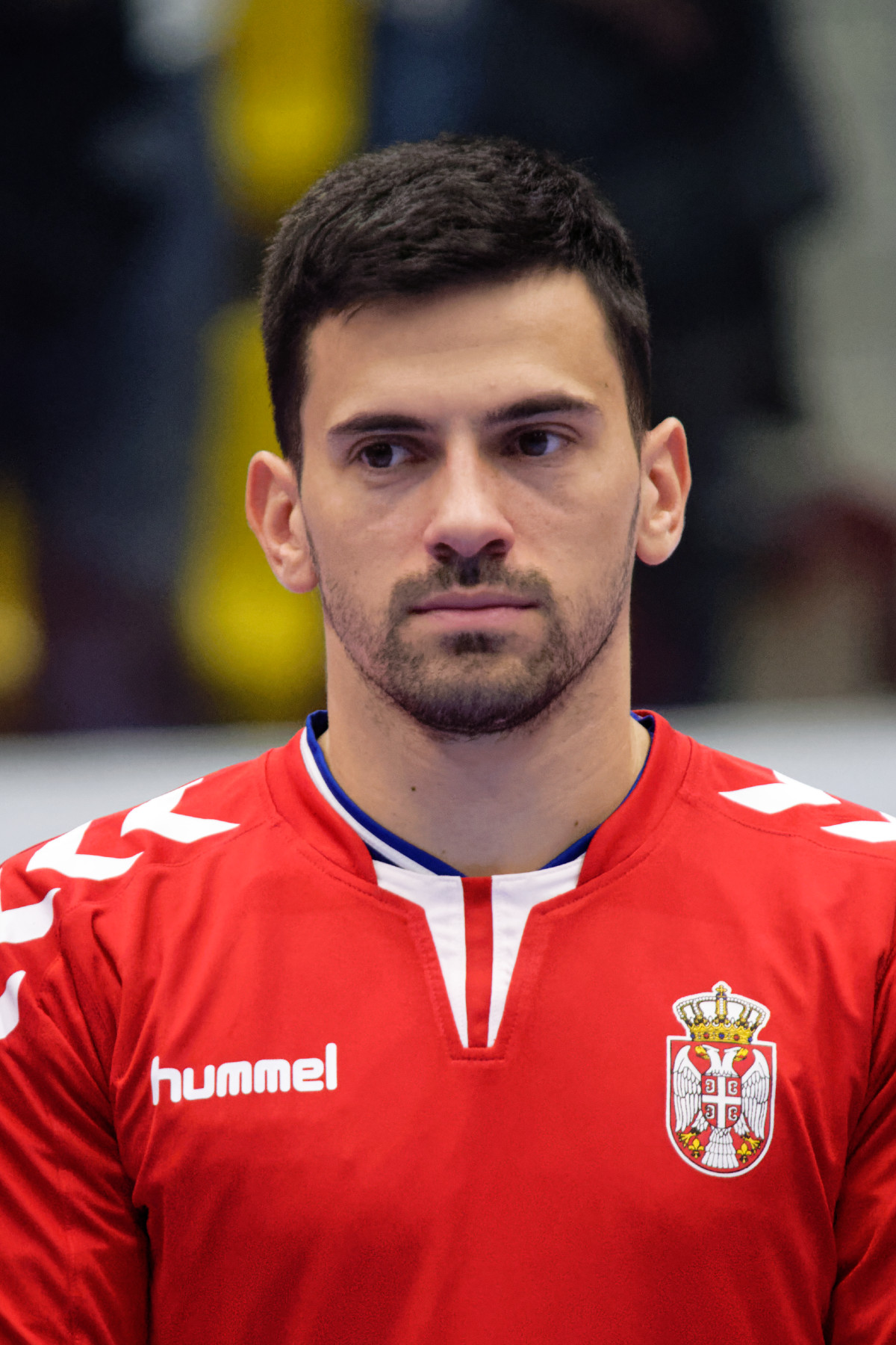 Freundschaftliches Handballspiel Österreich gegen Serbien am 28.10.2017 im BSFZ Südstadt. Bild zeigt: Nemanja Ilić